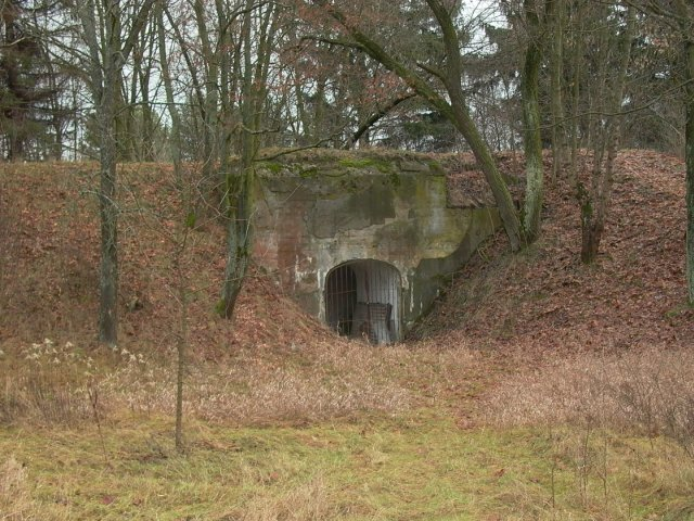 Zdjęcie przedstawia jedno z wejść do podwalni Fortu XVI Twierdzy Modlin. Autor: Zbigniew Strucki